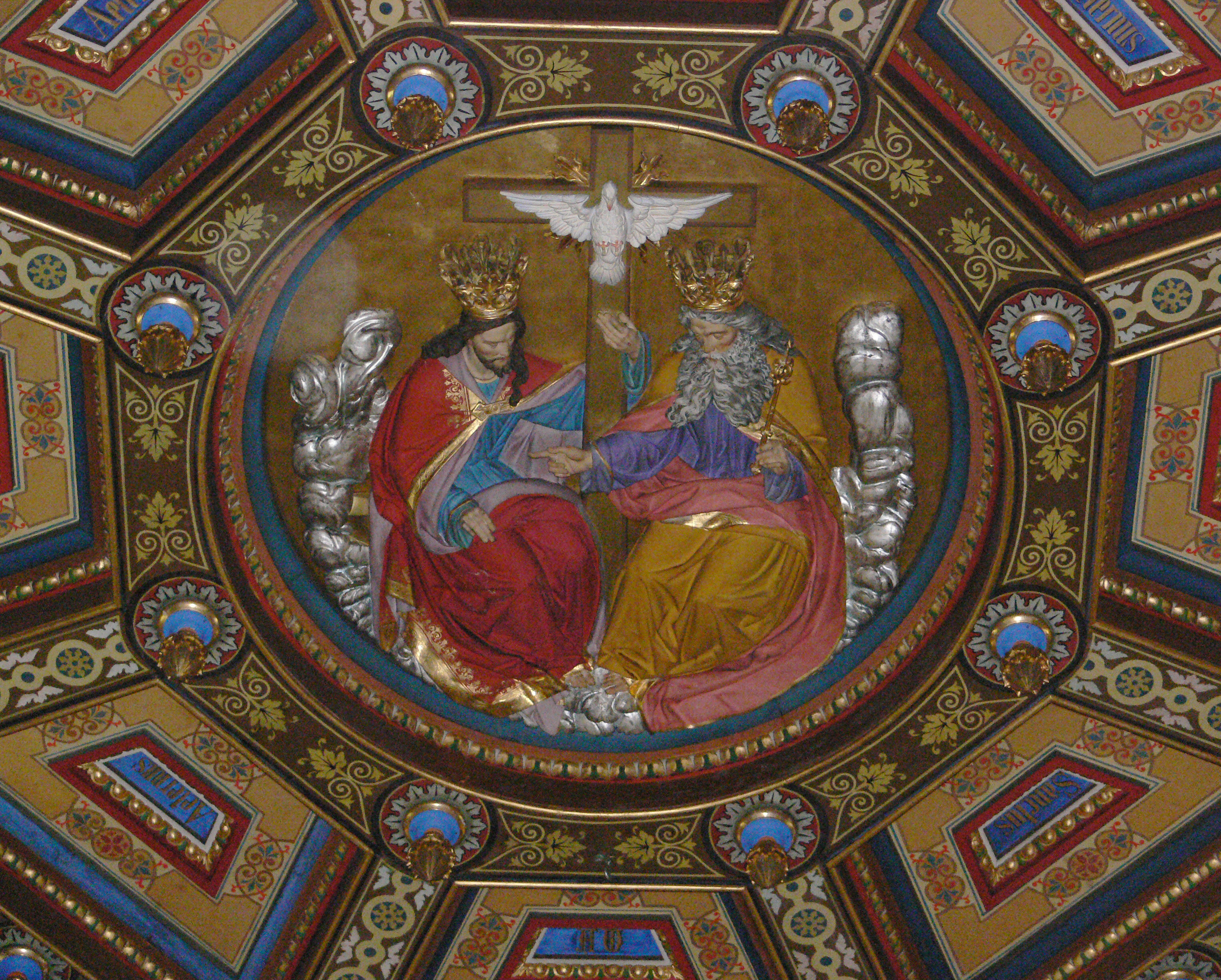 Kath. Pfarrkirche St. Johannes Baptista, Wuchzenhofen, Stadt Leutkirch im Allgäu Chor, Decke mit Relief der Dreieinigkeit